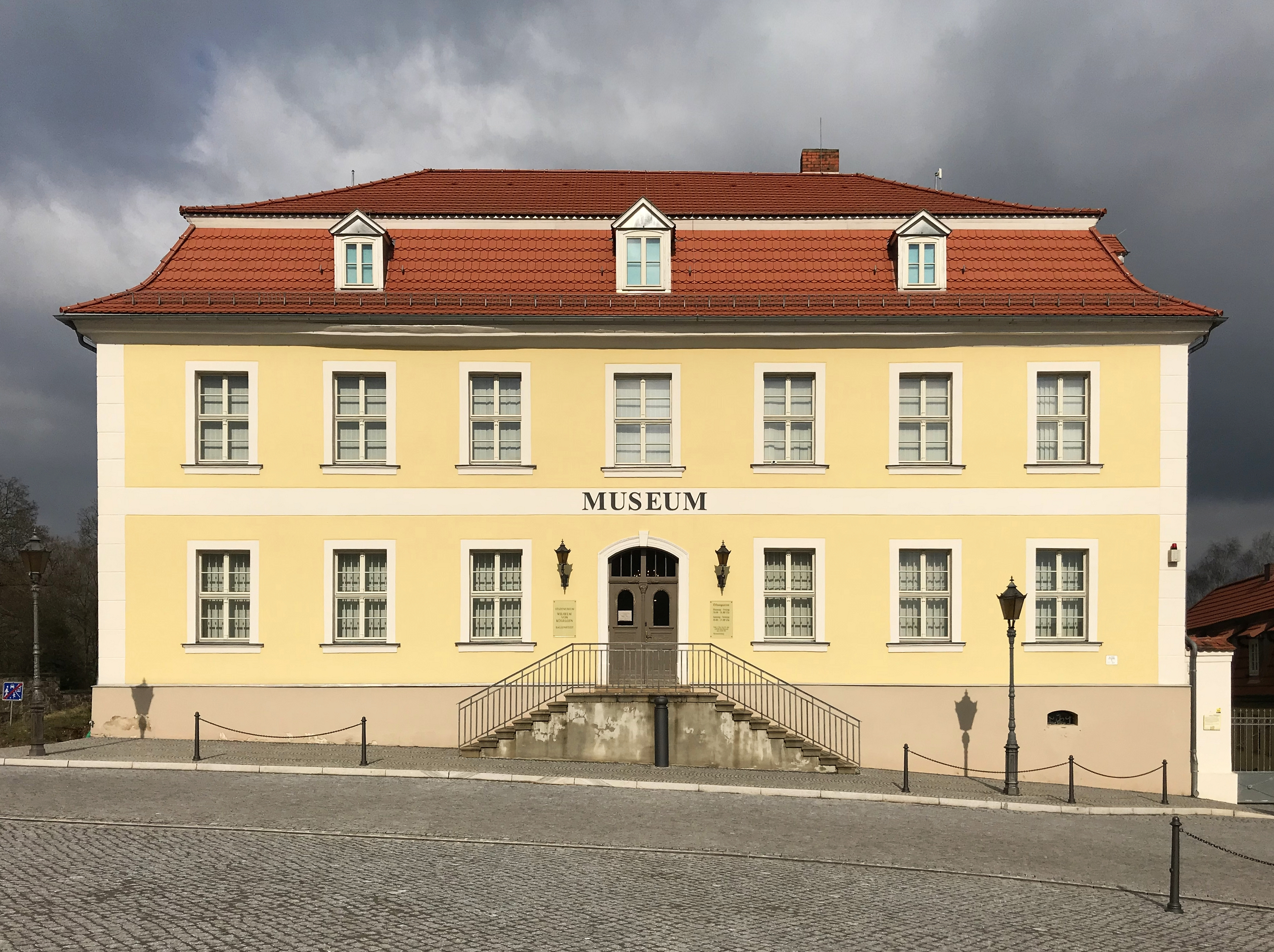 Gebäude Allee 37 in Ballenstedt